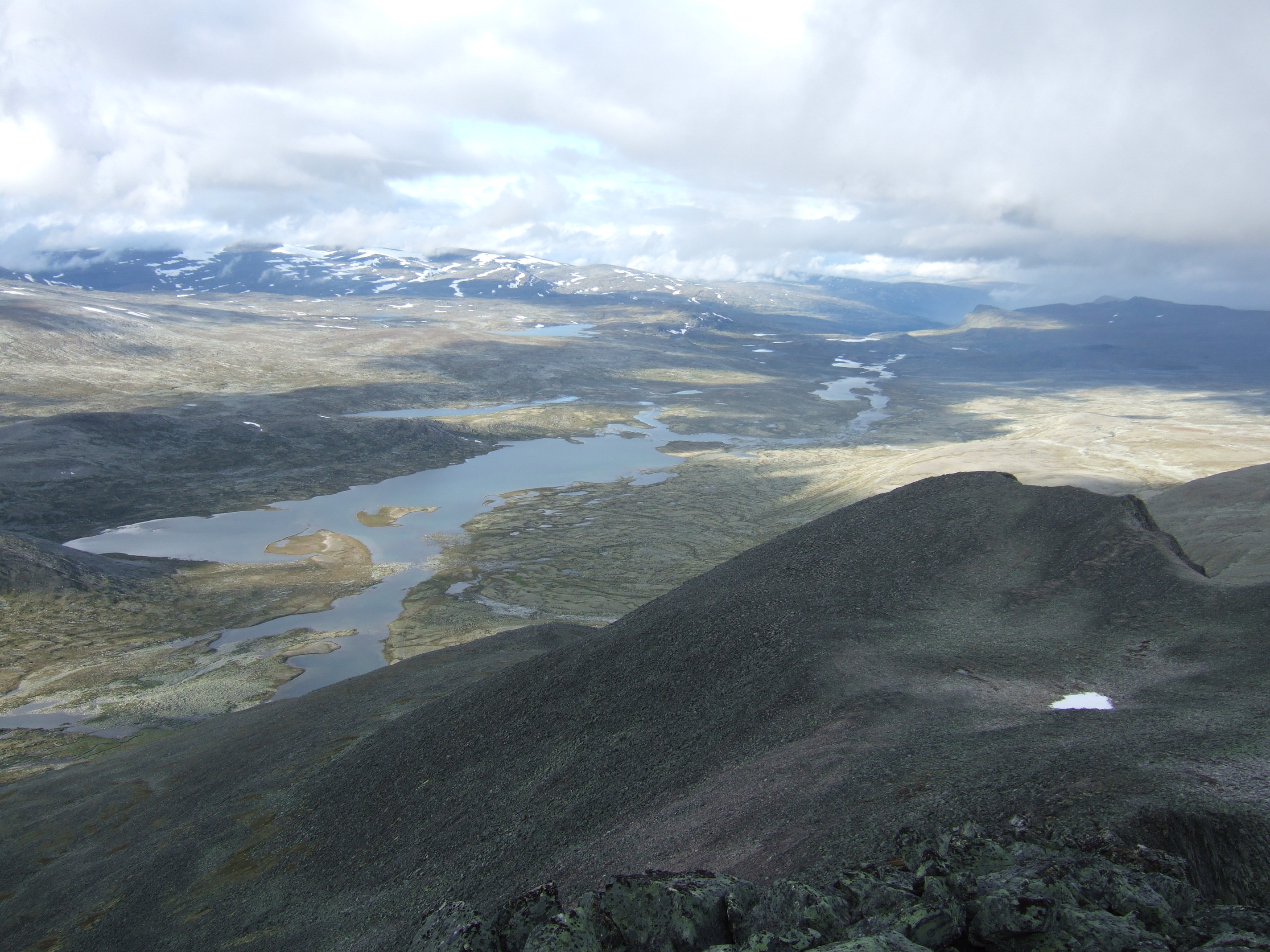 Åmotsflyin and Åmotsvatnet lake in Dovrefjell–Sunndalsfjella National Park